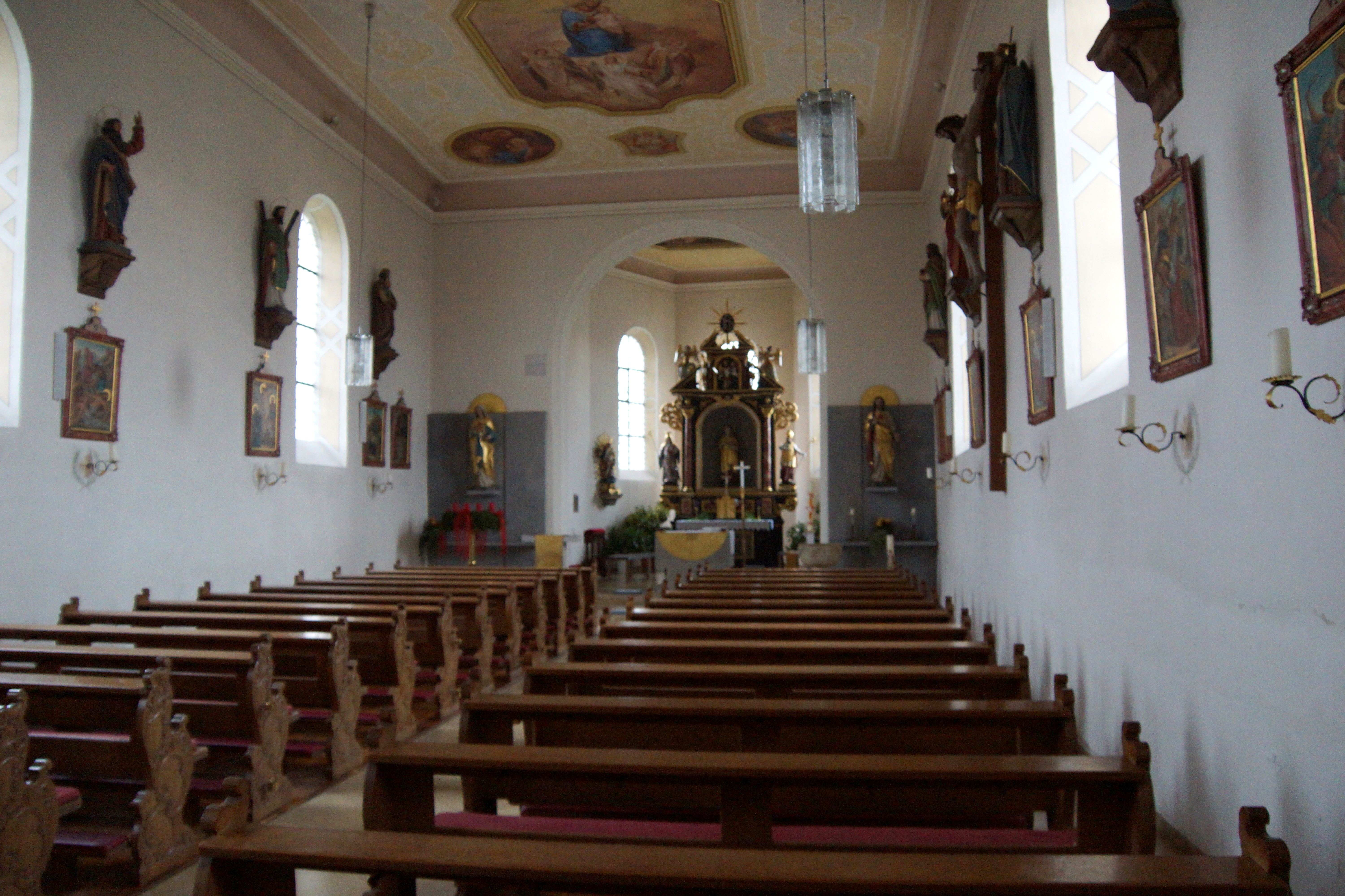 Die katholische Pfarrkirche St. Stephanus in Thannhausen